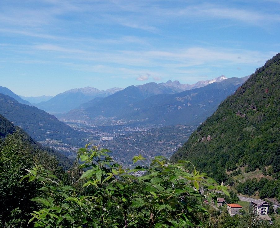 Aprica-hágó, Dolomitok, Olaszország